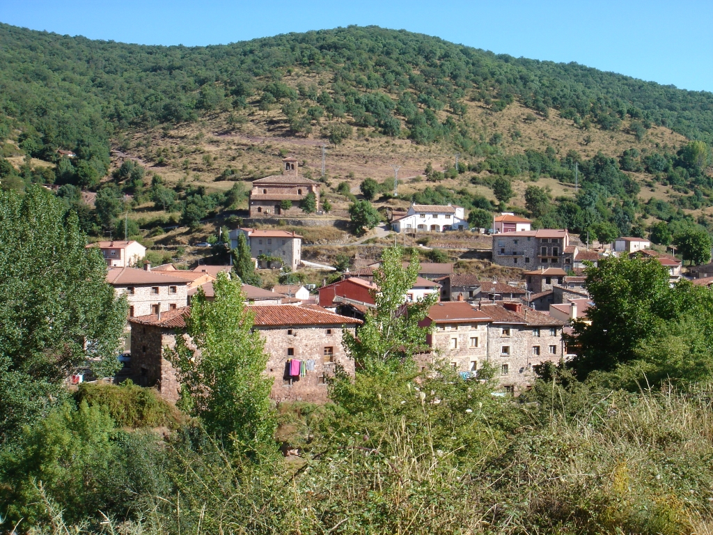 vista panorámica de Villavelayo